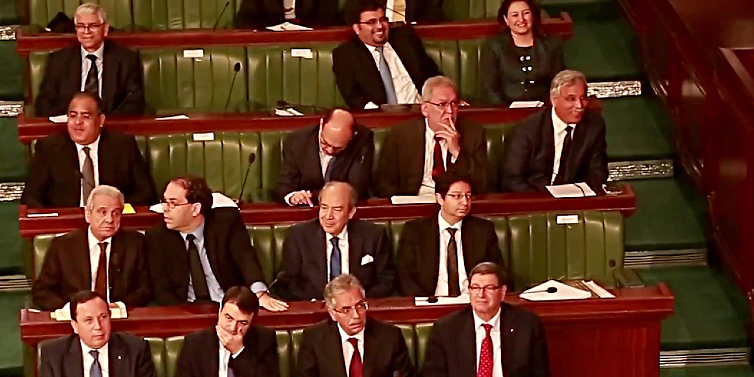 Interview de Nawaat à l'Assemblée, Tunisie